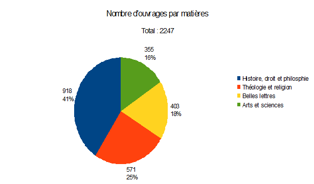 Répartition par matière des ouvrages du legs de l'abbé boisot